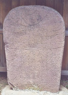 Description: Statue-menhir du Moulin de Louat, Murat-sur-Vèbre, (Tarn) France, 81 Source: Hugo Soria Licence: GFDL Hugo Soria